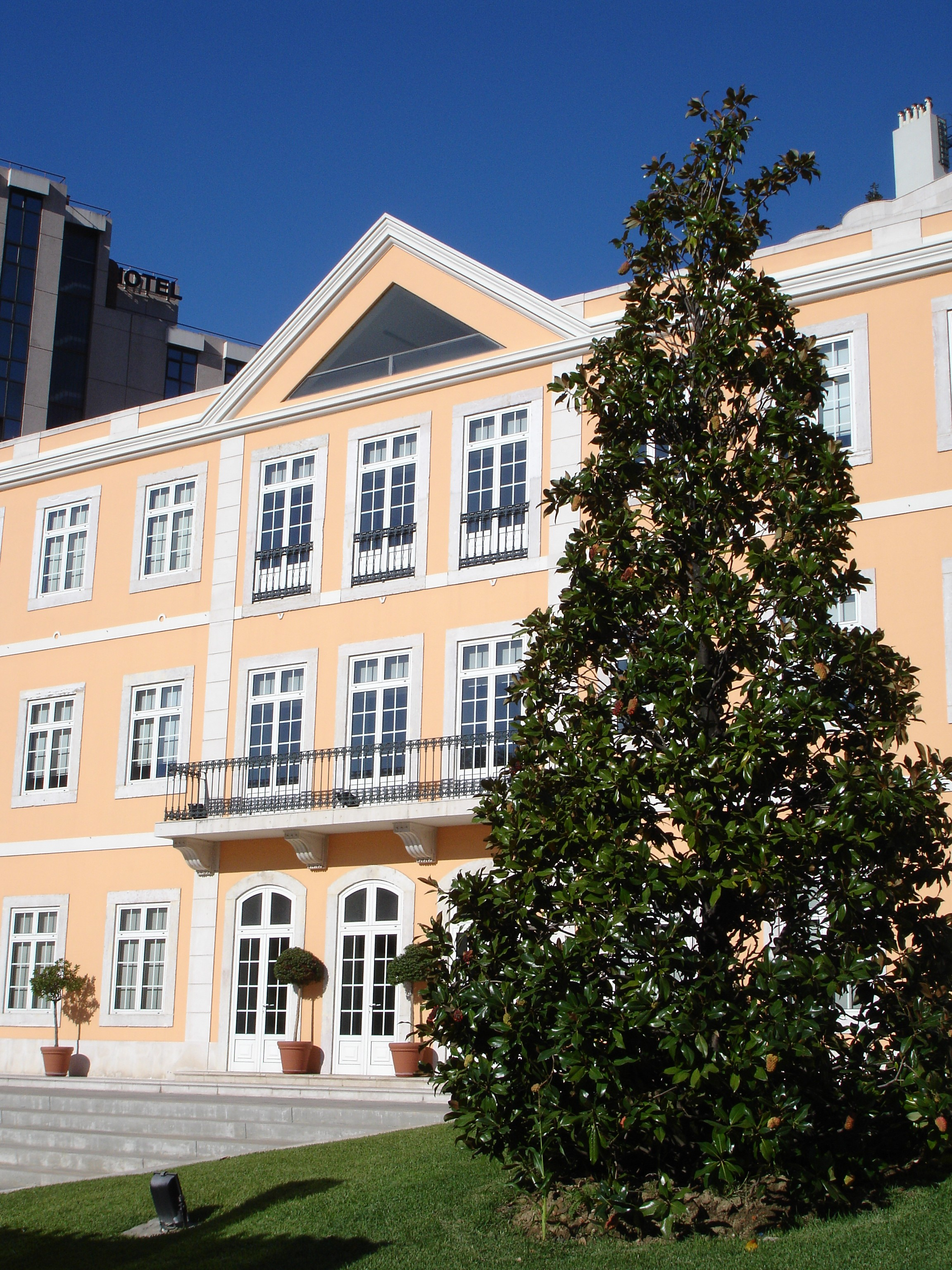 Fachada da Fundação Cidade de Lisboa